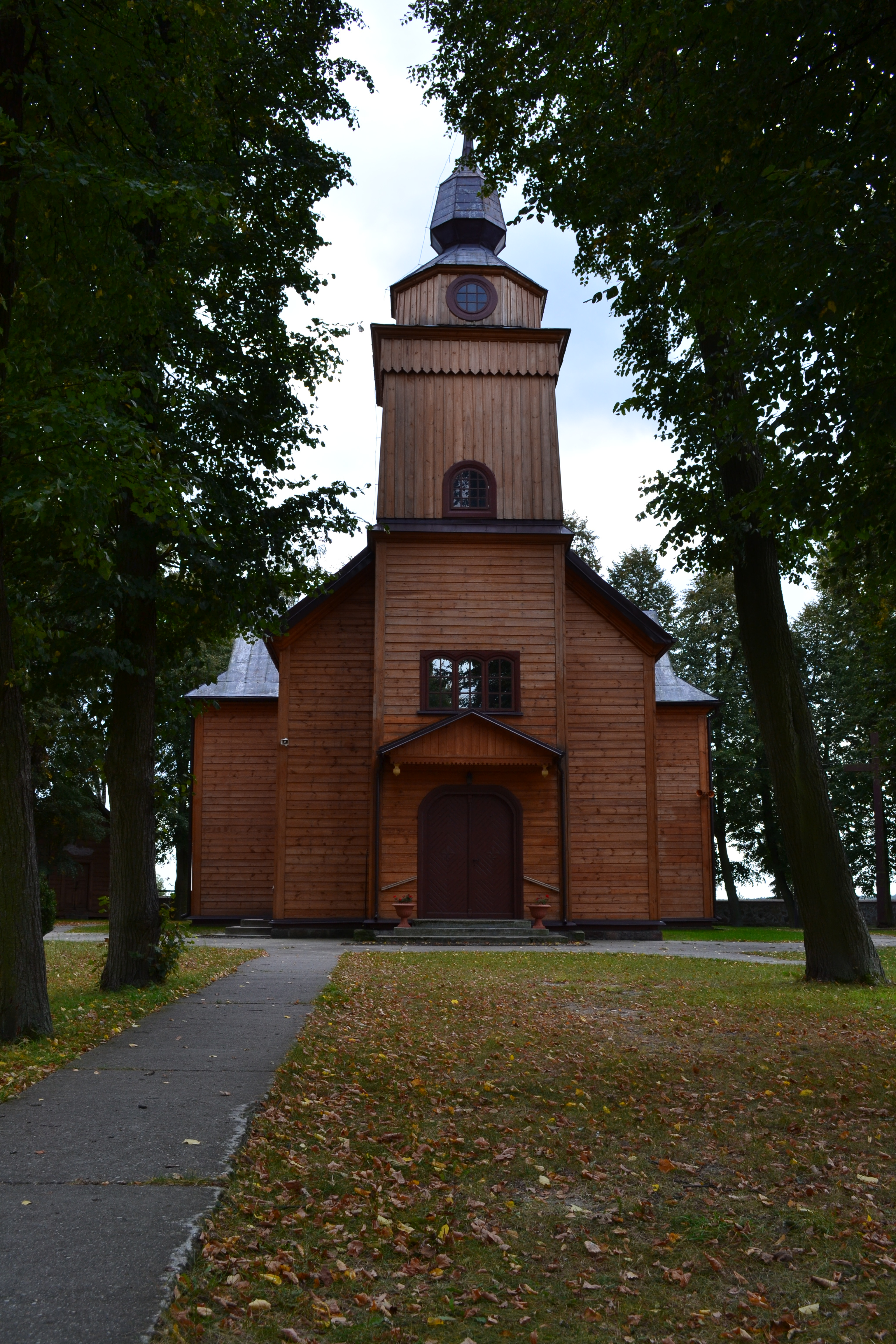 Polskowola - kościół parafialny p.w. śś. Janów Ap. i Ewangelisty, drewniany z 1921r.